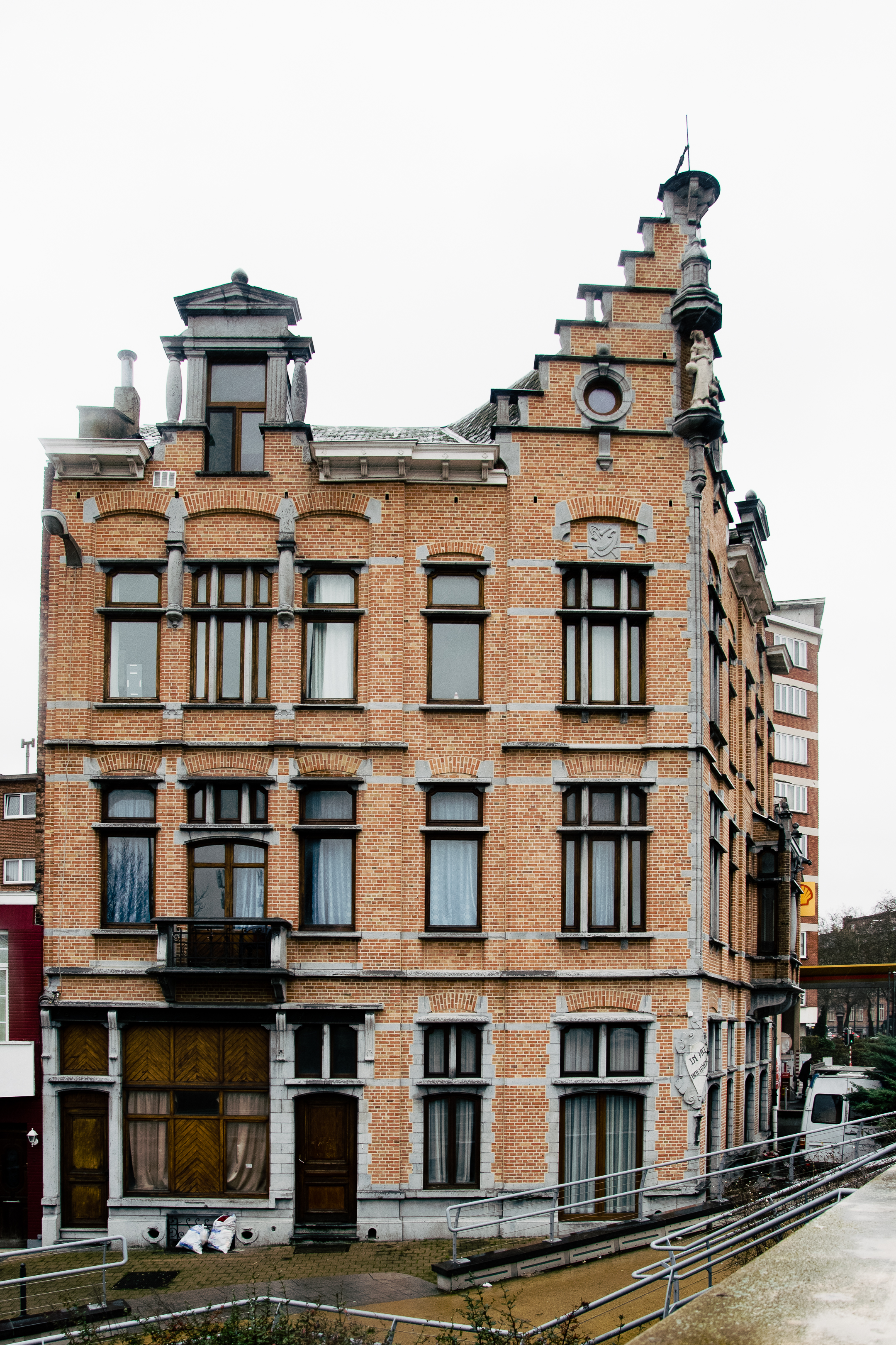 Rez-de-chausée commercial et café